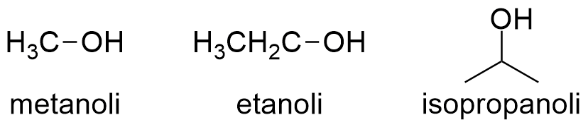 metanolin, etanolin ja isopropanolin rakenteet